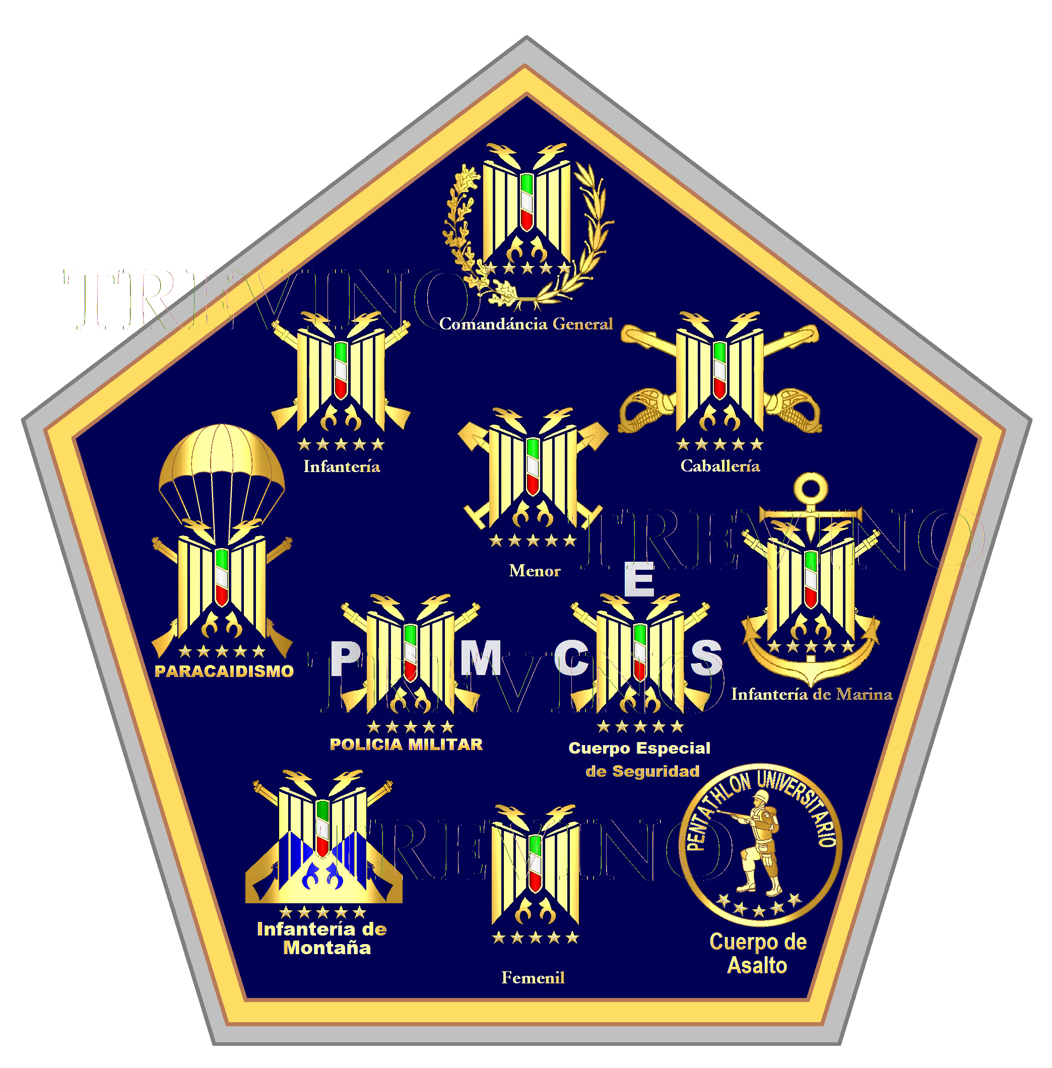 Escudos de usanza del Pentathlon Deportivo Militarizado Universitario